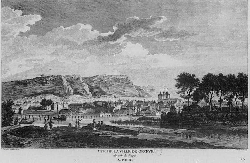 Gravure de François Denis Née. Vue de la ville de Genève du côté des Paquis